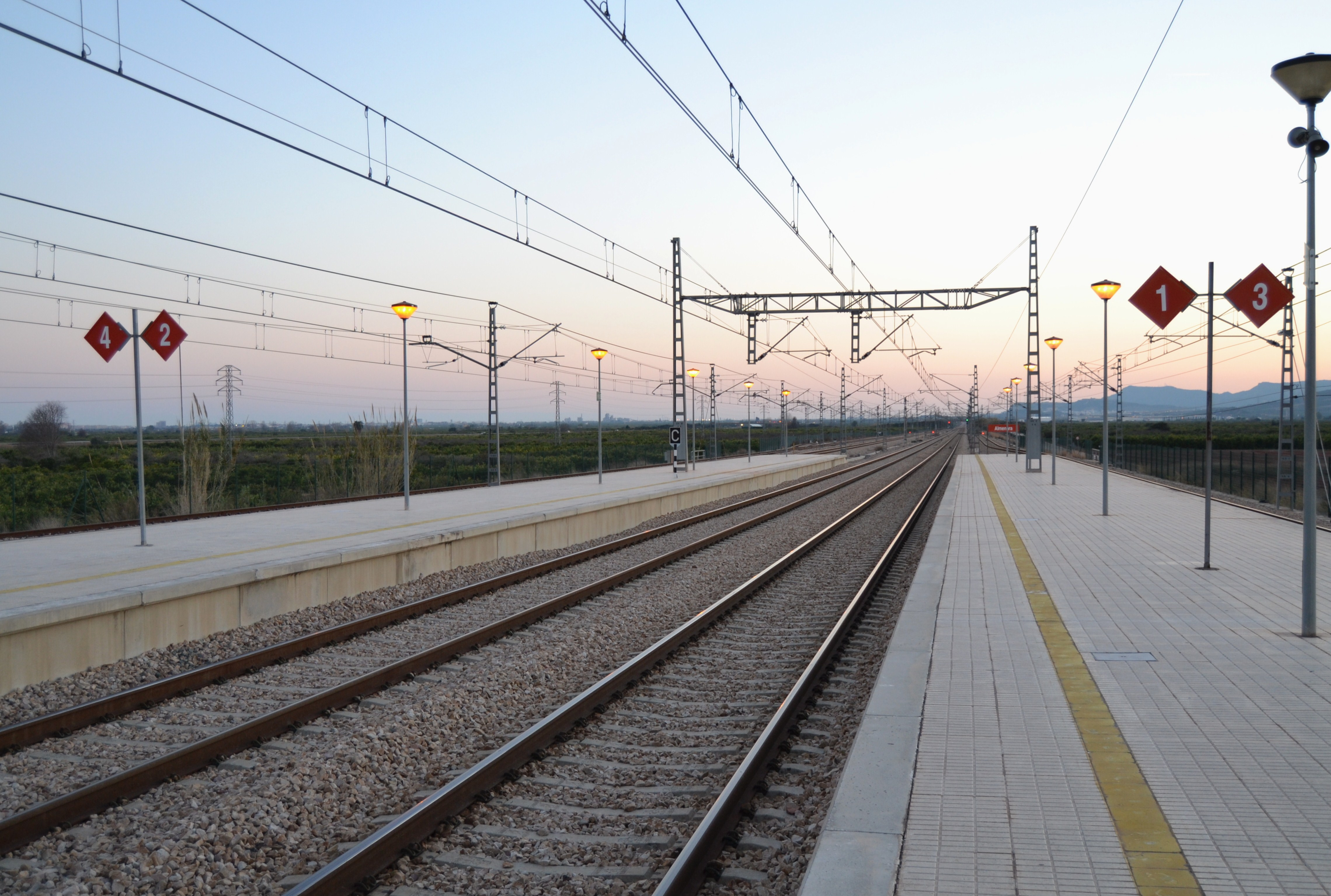 Estació d'Almenara, andanes i vies.